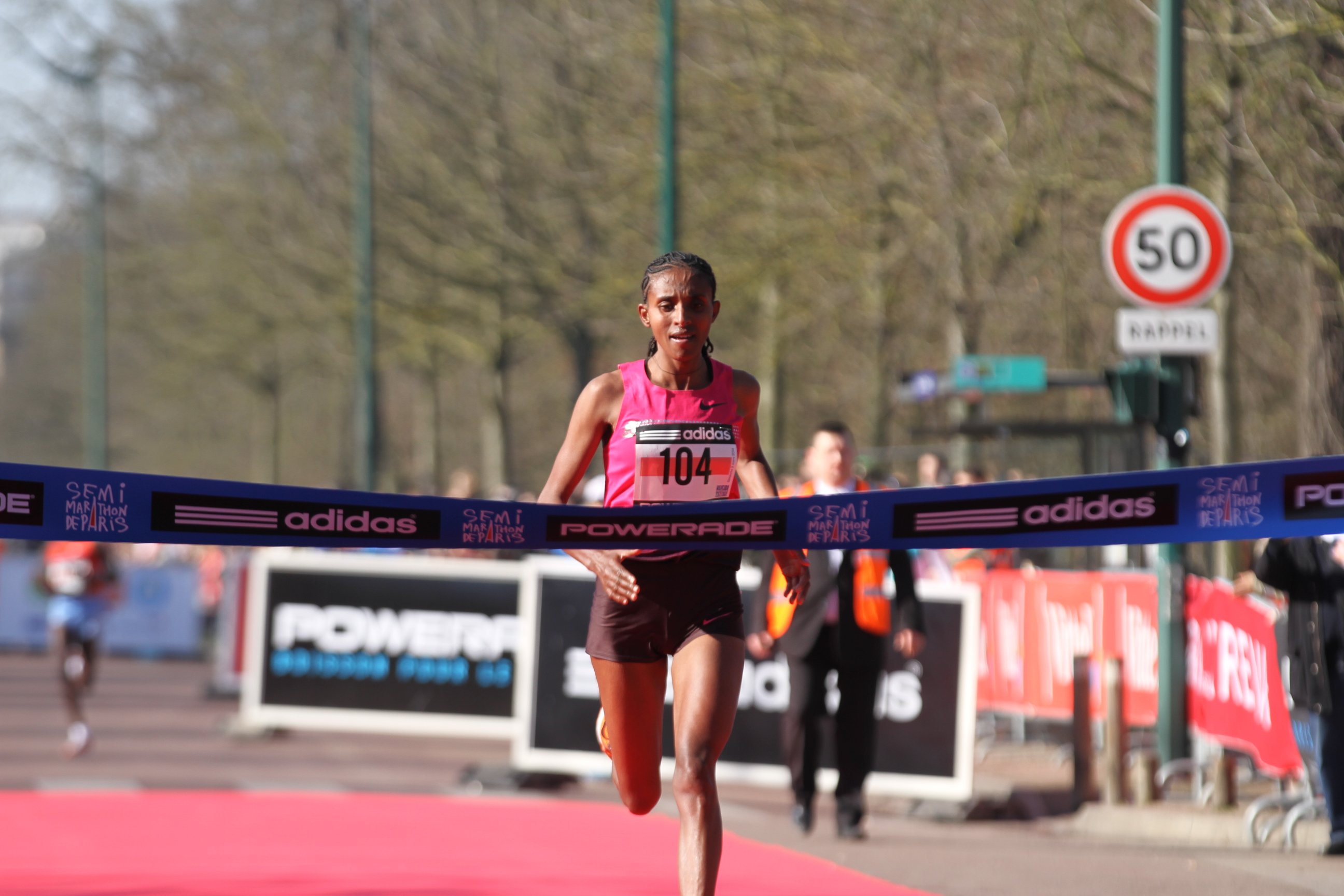 Yebrugal Melese remportant le semi-marathon de Paris 2014.